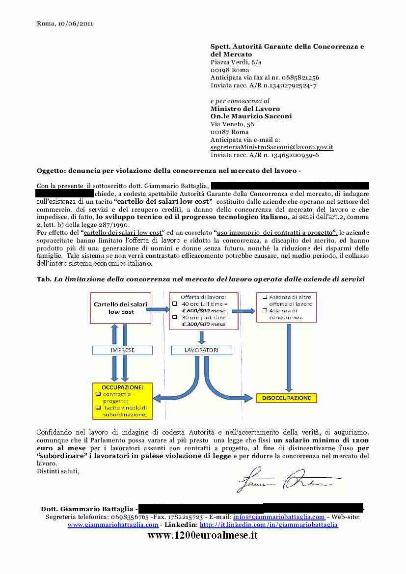 Lettera inviata all'Antitrust il 10 giugno 2011 per denunciare la costituzione di un "tacito cartello dei salari low-cost" da parte delle aziende di servizi, commercio e recupero crediti a danno dei lavoratori e del sistema economico italiano.